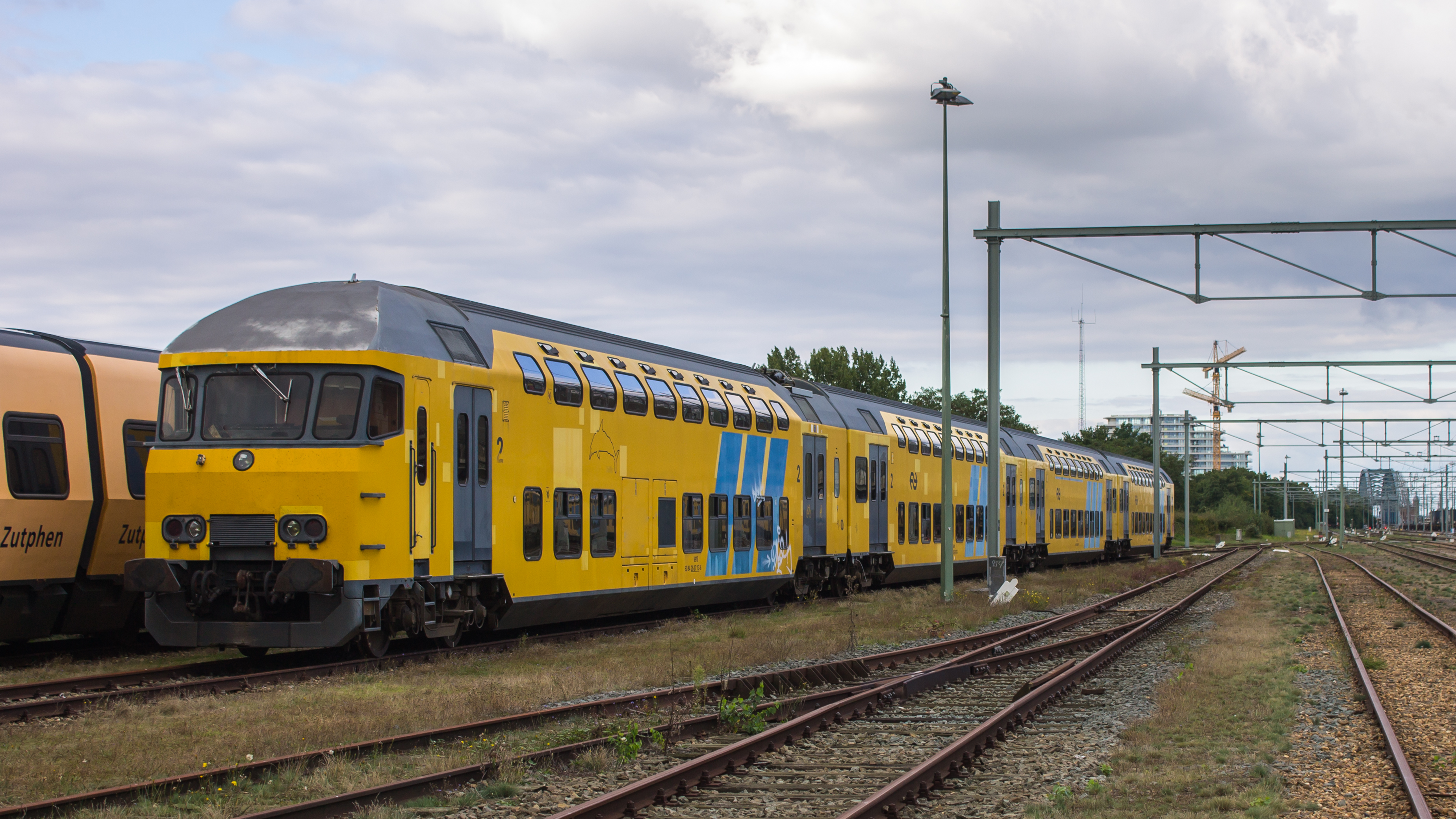 Het DDM-1 wordt weer gereactiveerd. De laatste tijd zijn door VolkerRail de rijtuigen bij elkaar gerangeerd, en de stam met koprijtuig 'Dolfijn' (rijtuig 50 84 26-37 113-6) staat helemaal vooraan. Wanneer het setje rijtuigen richting de Zaanstraat gaat, is mij niet bekend. NS Reizigers DDM-1 'Dolfijn', Nijmegen. 27 september 2015, © 2015 Bas Meijer.